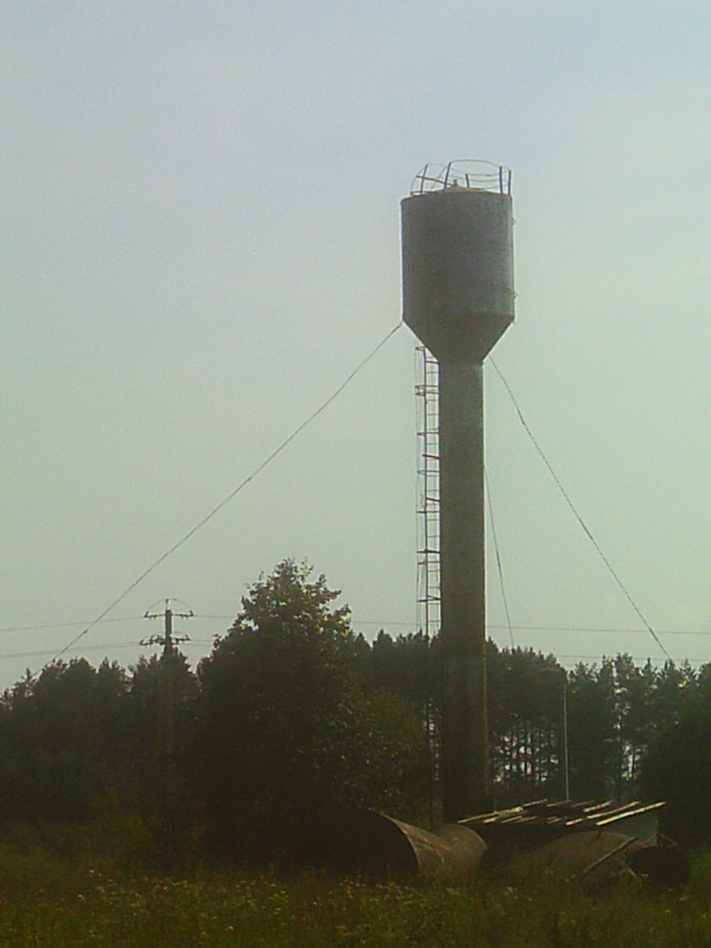 Водонапорная башня в Слудах (Вологодская область)